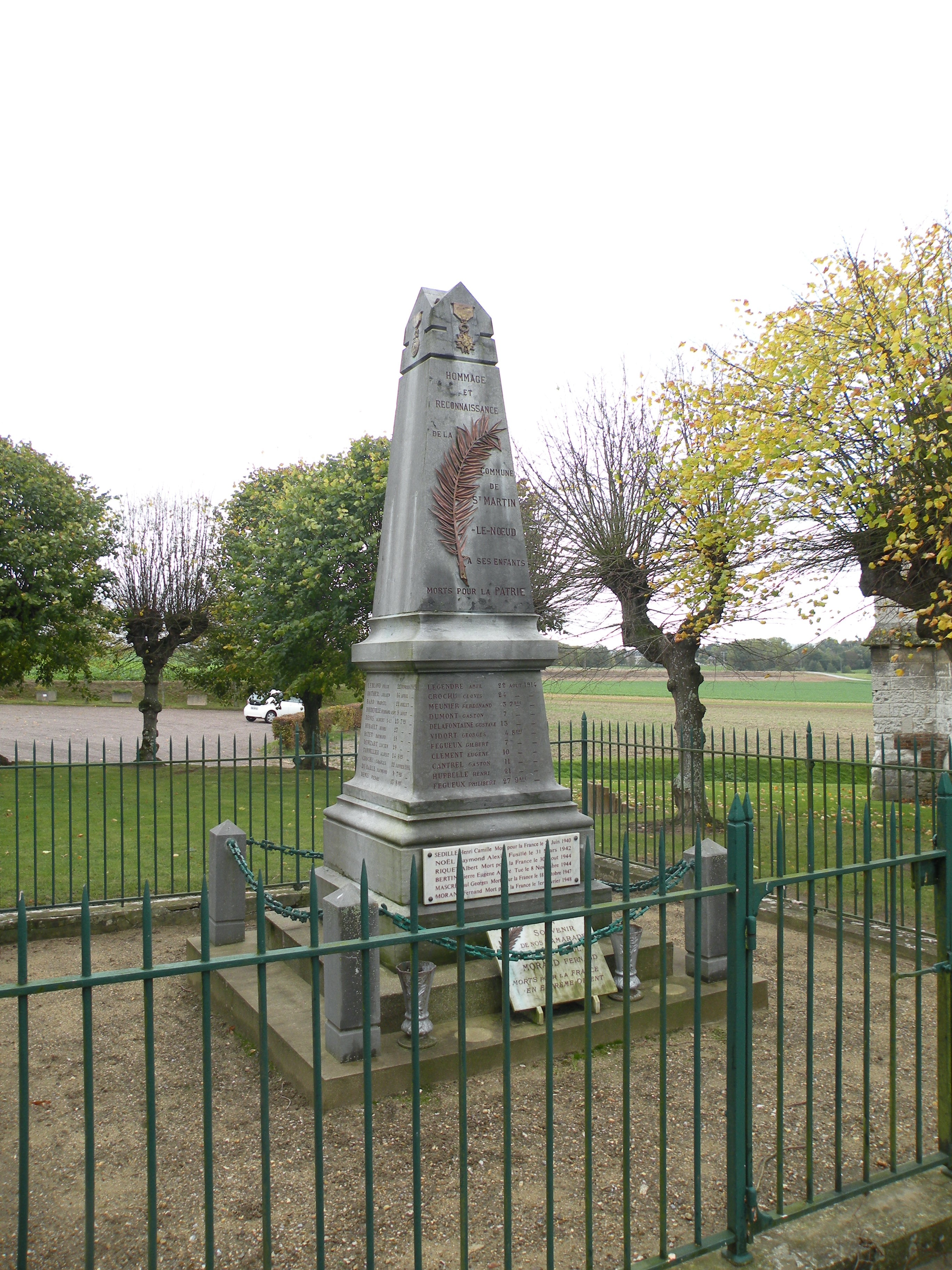 Aux Marais monuments aux morts